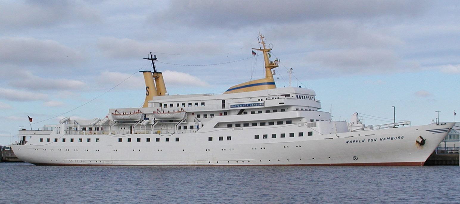 Das Baderschiff Wappen von Hamburg